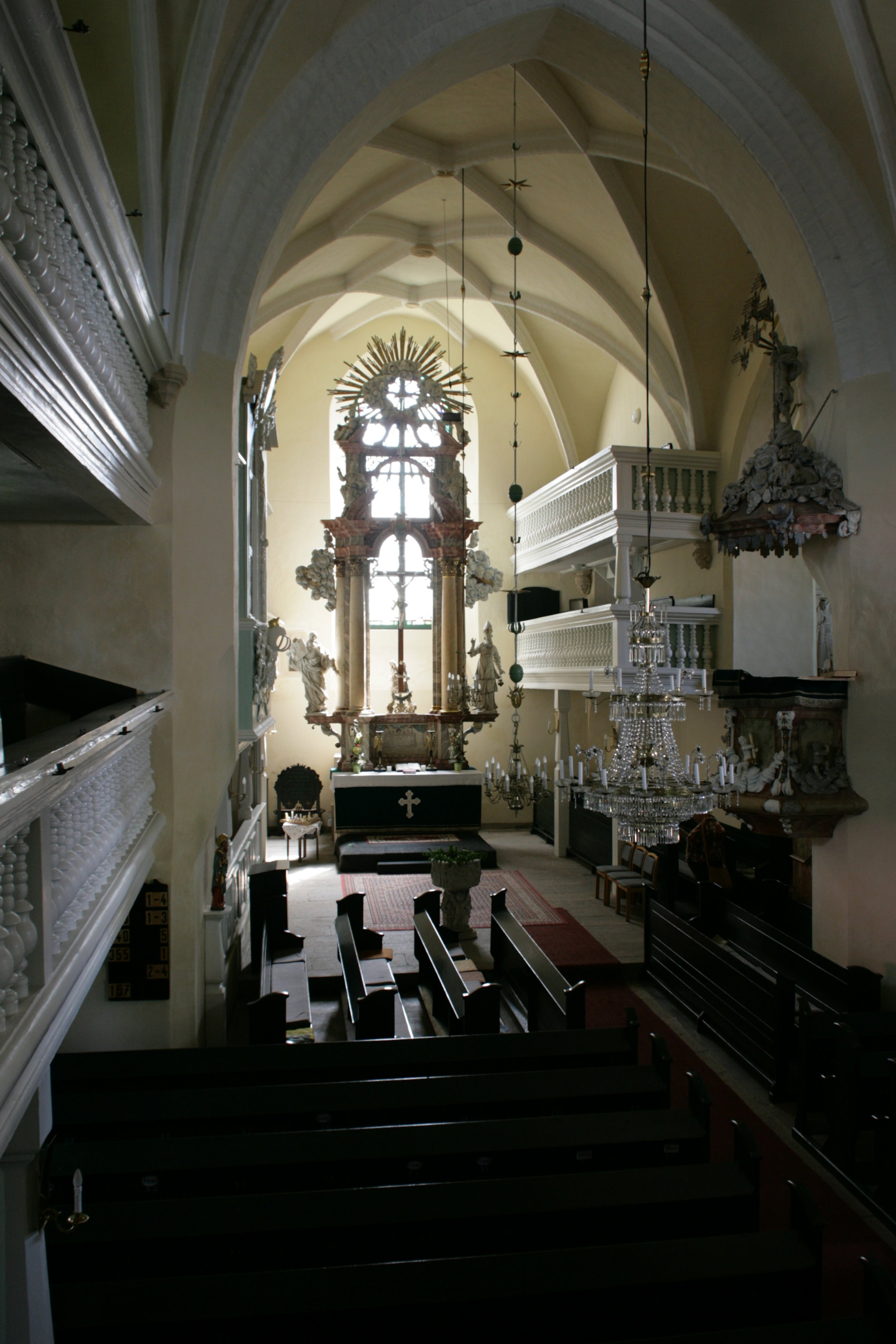 Evangelische Kirche Ebersbach, Kirchberg in Ebersbach, Schöpstal